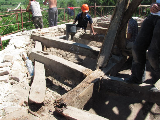 Sicherungsarbeiten an dem Dachstuhl der Mardischer Kirche. Projektleitung H. Gröbmayr